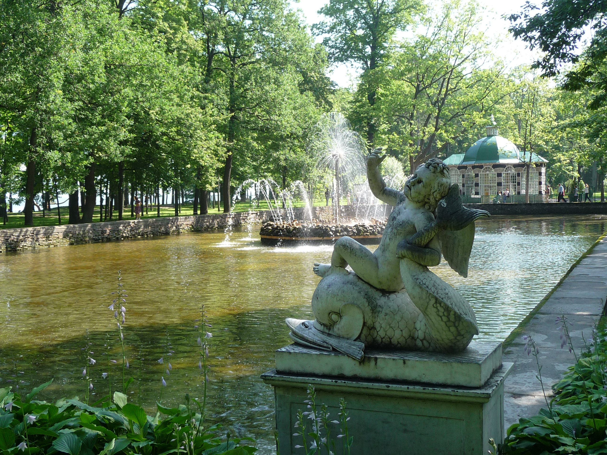 Palace-p1030895.jpg